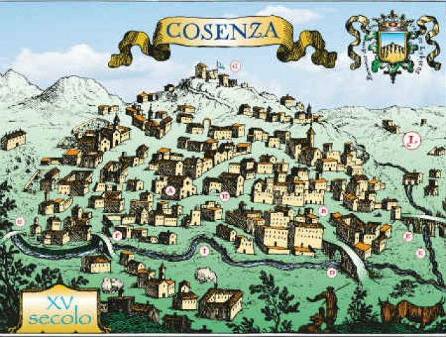 Un dipinto della citta' di Cosenza risalente al XV secolo